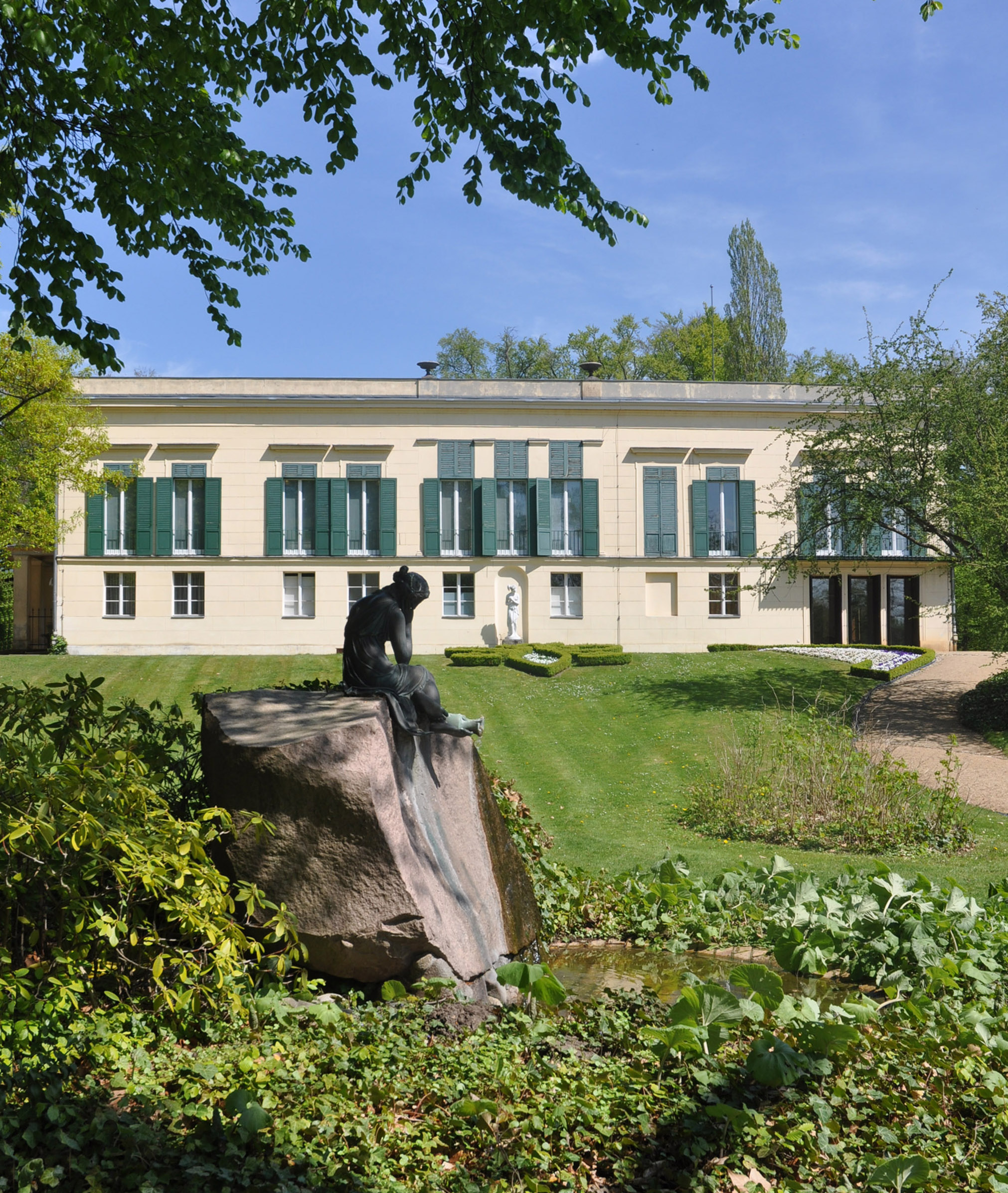 Park Klein-Glienicke, Laitièrenbrunnen und Westfassade des Schlosses